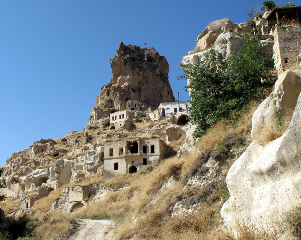 Cappadocia